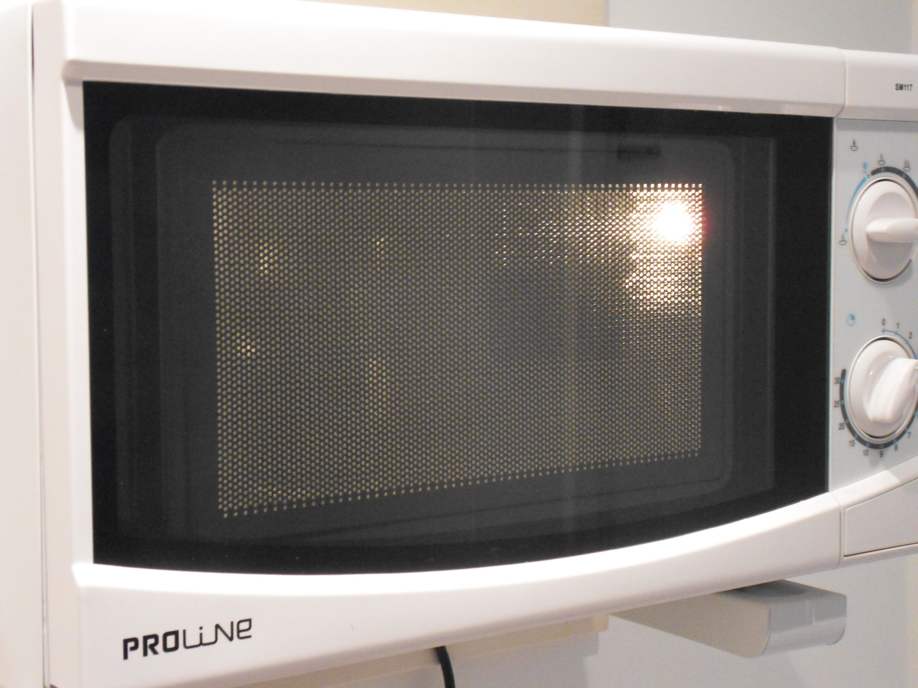 Een magnetron van het merk ProLine in werking.